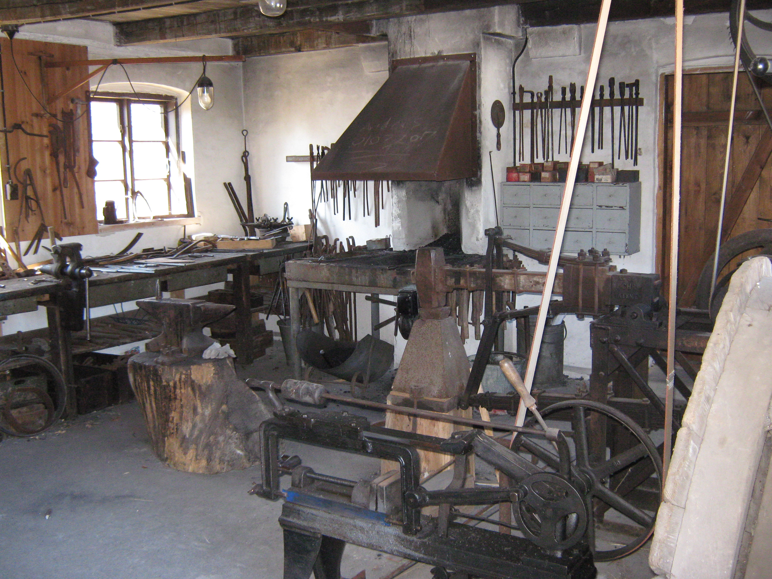 Smedeværksted fra Rynkeby. Smedjen. Frilandsmuseet.